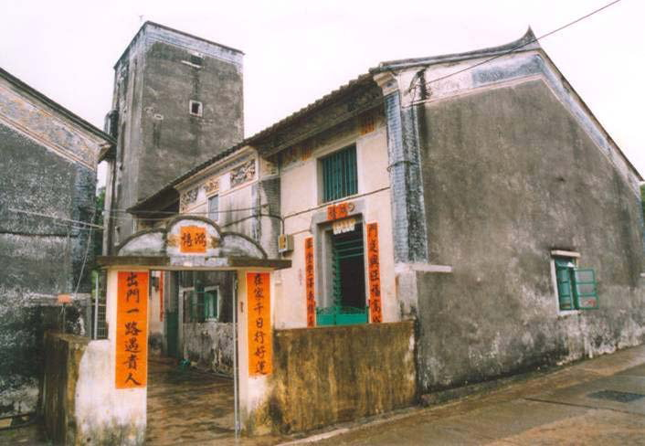 香園圍4-5號